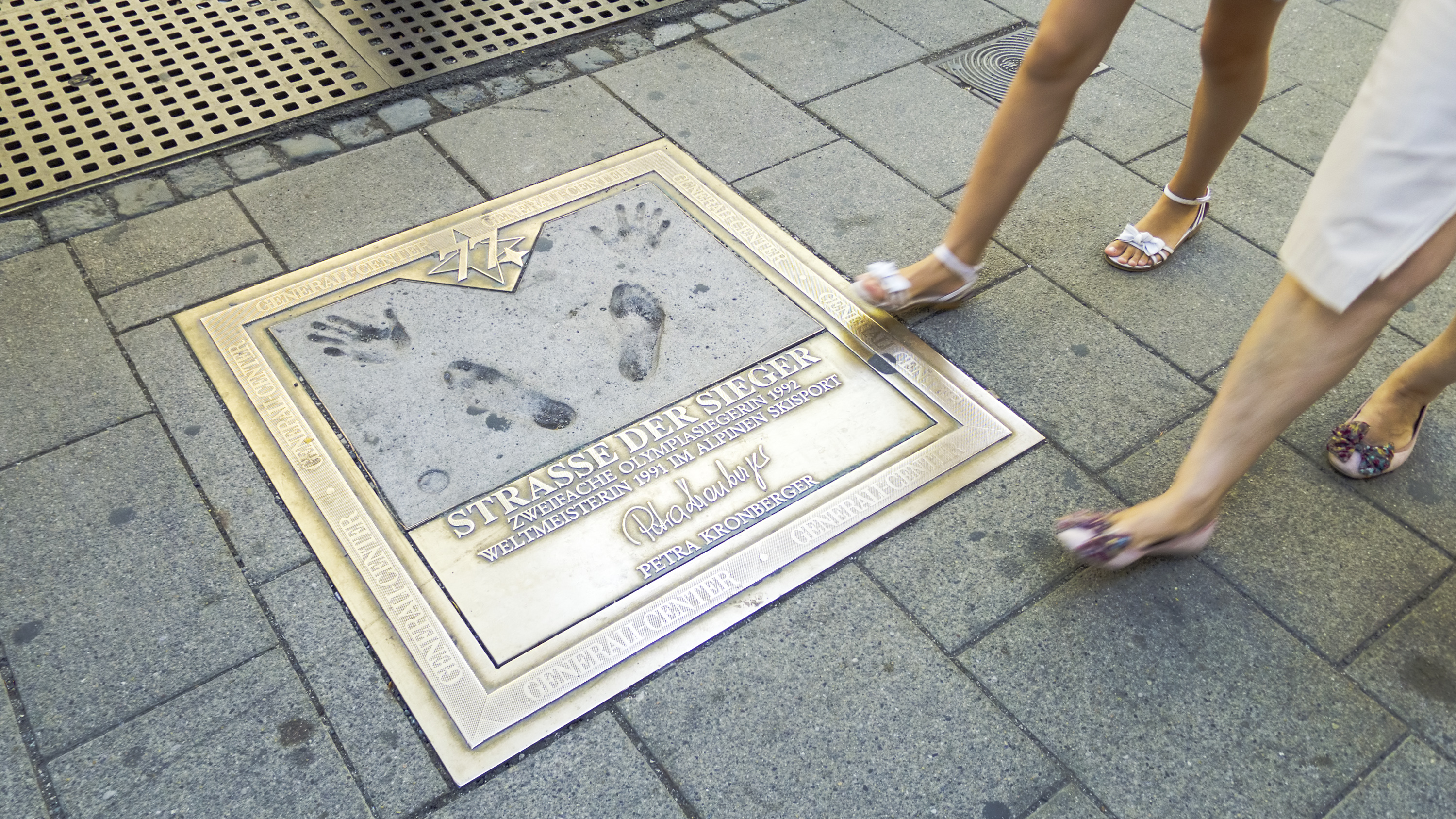 „Straße der Sieger“ in Wien 6, Mariahilfer Straße 77